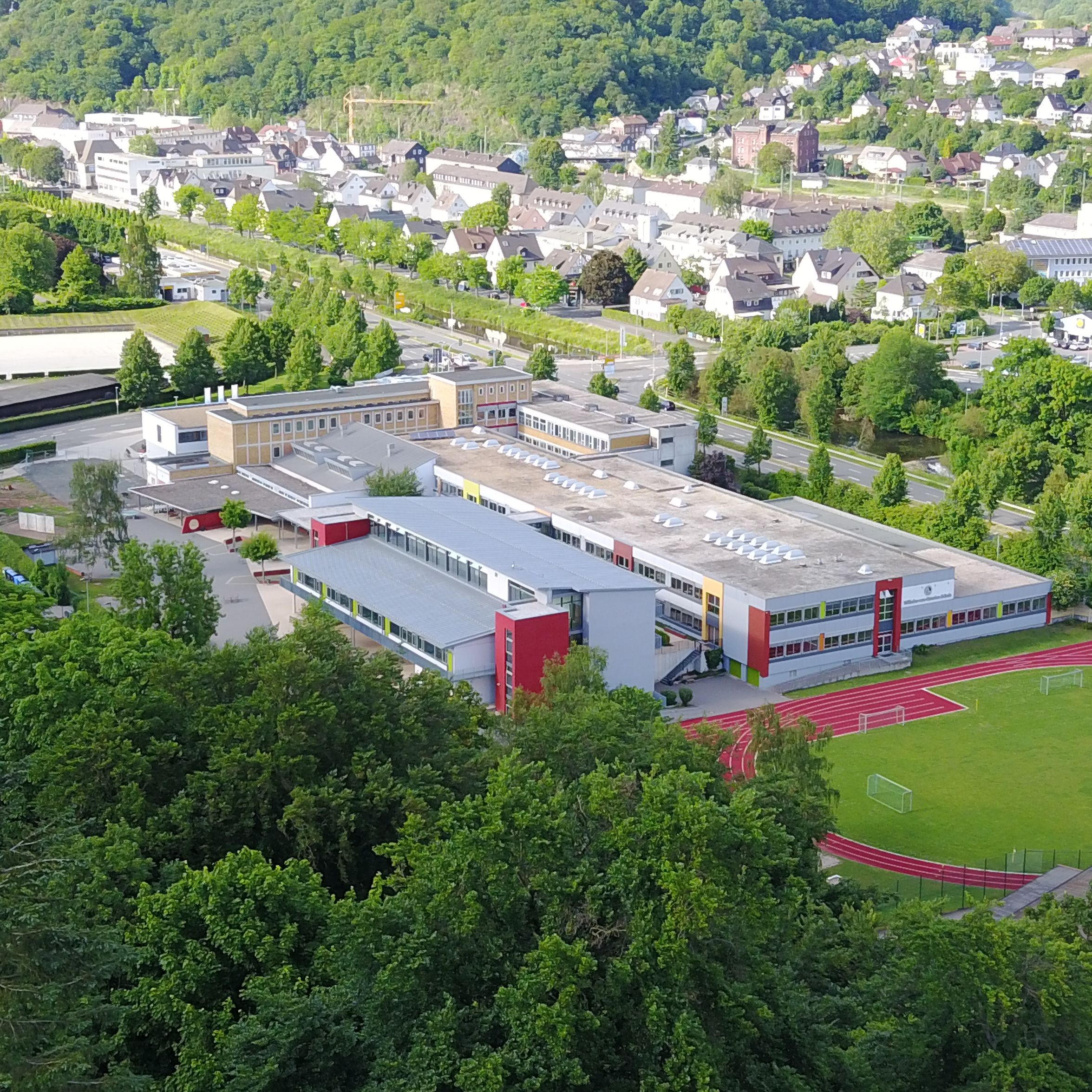 Die Wilhelm-von-Oranien-Schule in ihrem heutigen Gebäude an der Jahnstraße